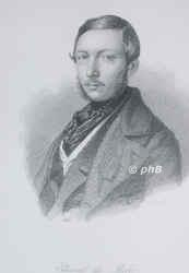 Edouard de Bièfve (1809-1882). Belgischer Historienmaler. H. D. von Diepenbroik-Grüter, Allgemeiner Porträt-Katalog. Hamburg 1931 f.